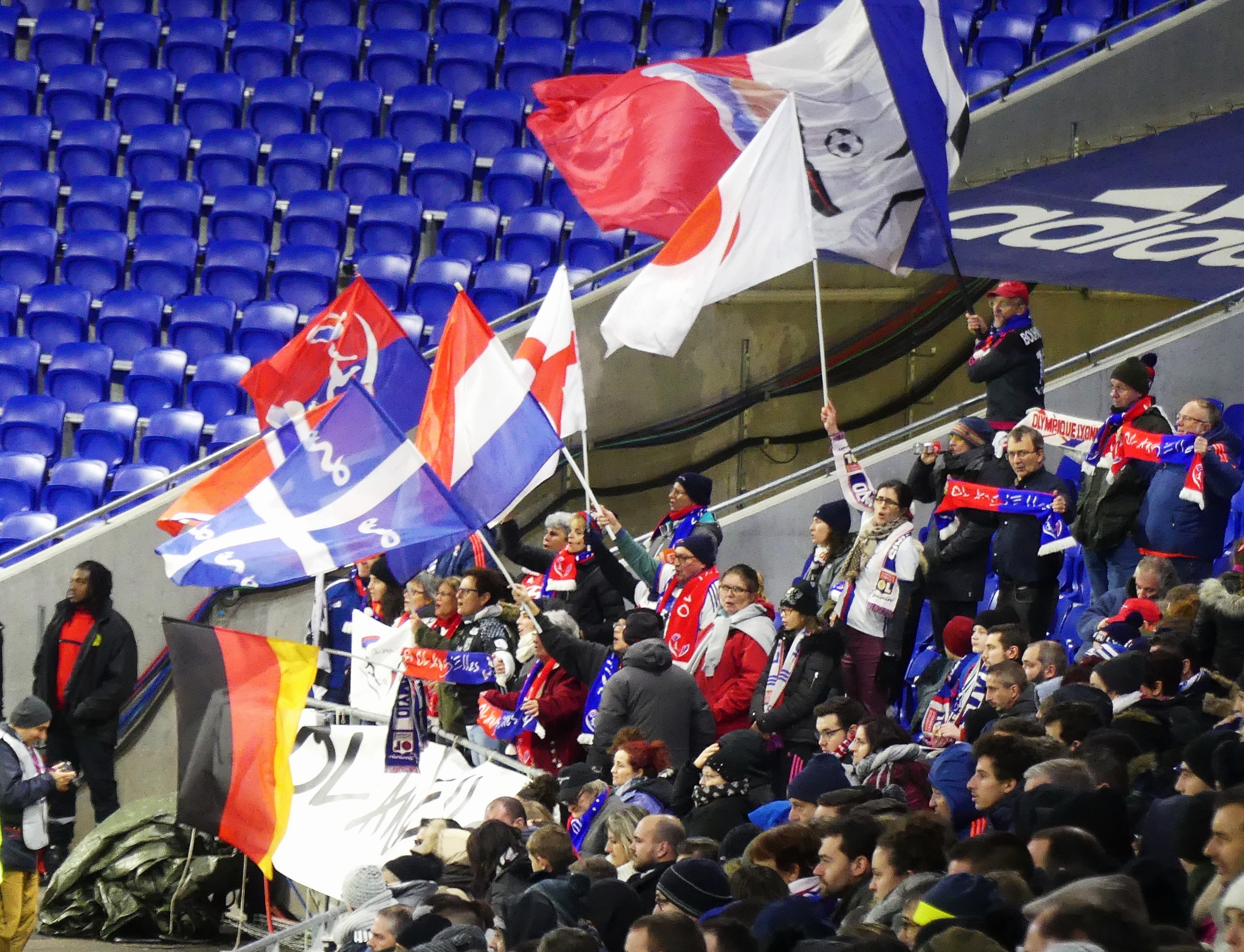 OL Ang'Elles, groupe de supporter lyonnais lors du match de l'Olympique lyonnais féminin face au Paris Saint-Germain en championnat le 11 décembre 2017.